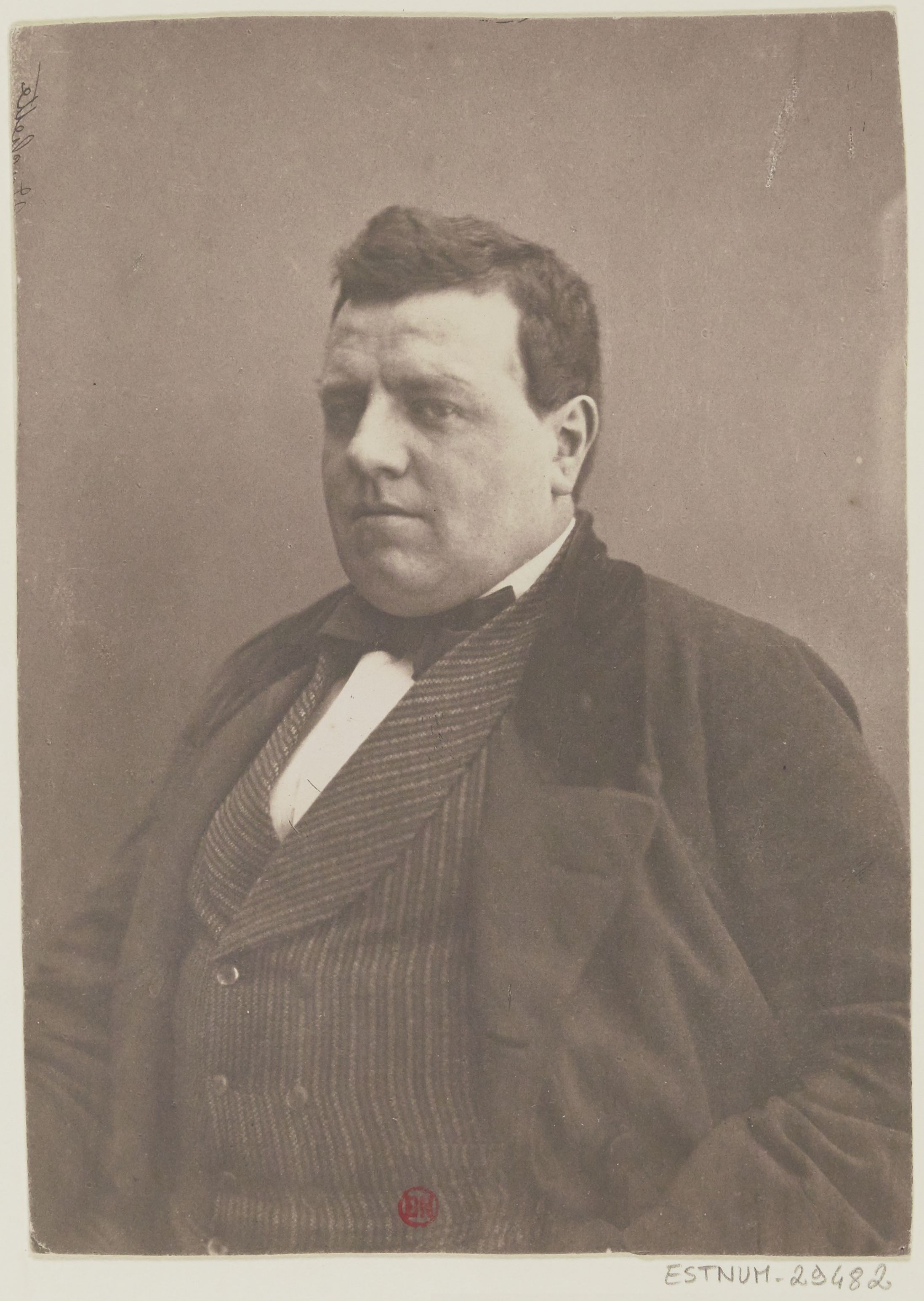 Portrait d'Eugène Chavette (1827-1902) par Nadar.